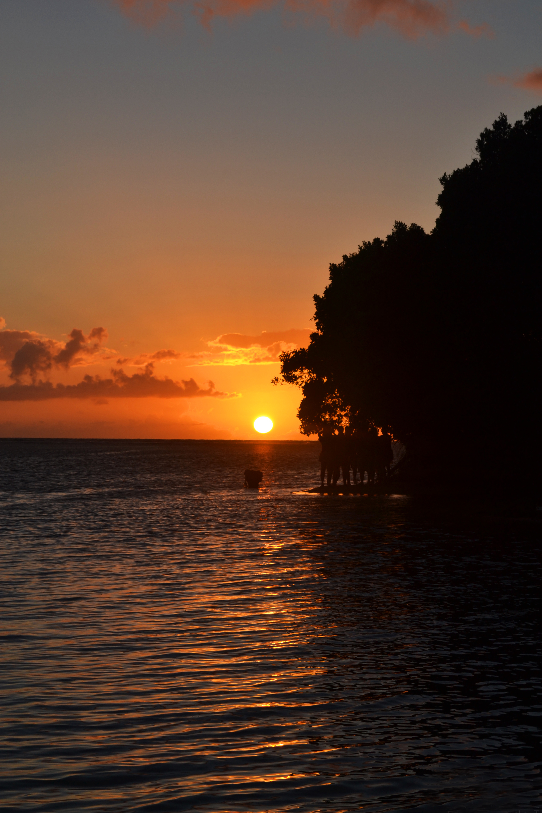 Adicora - Coro